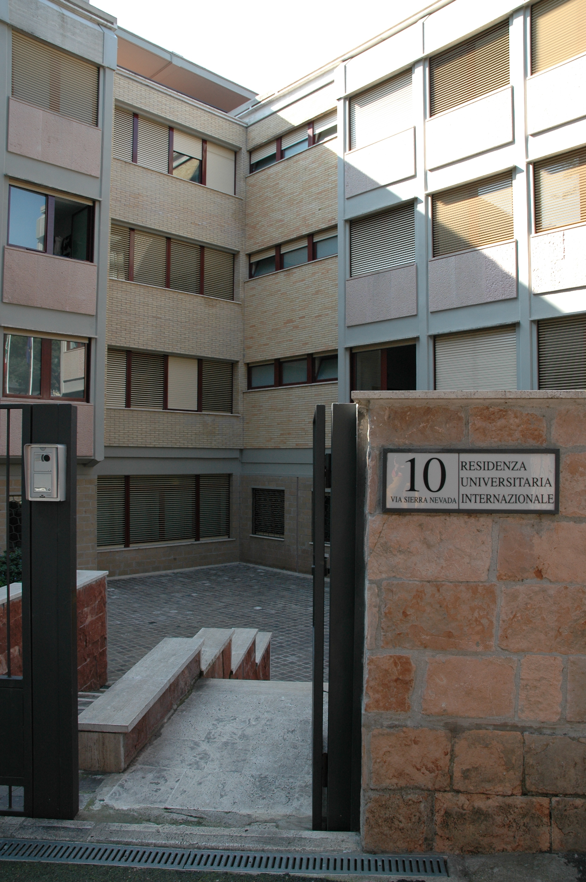 Ingresso principale del Collegio RUI